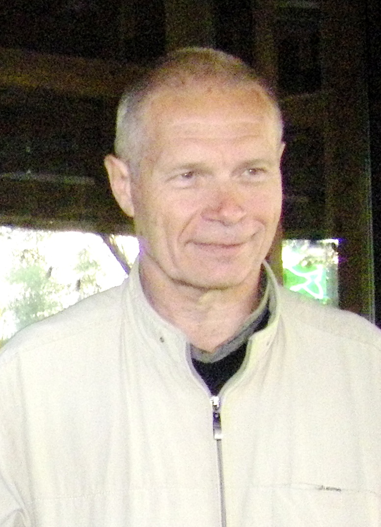 Andrus Ristkok